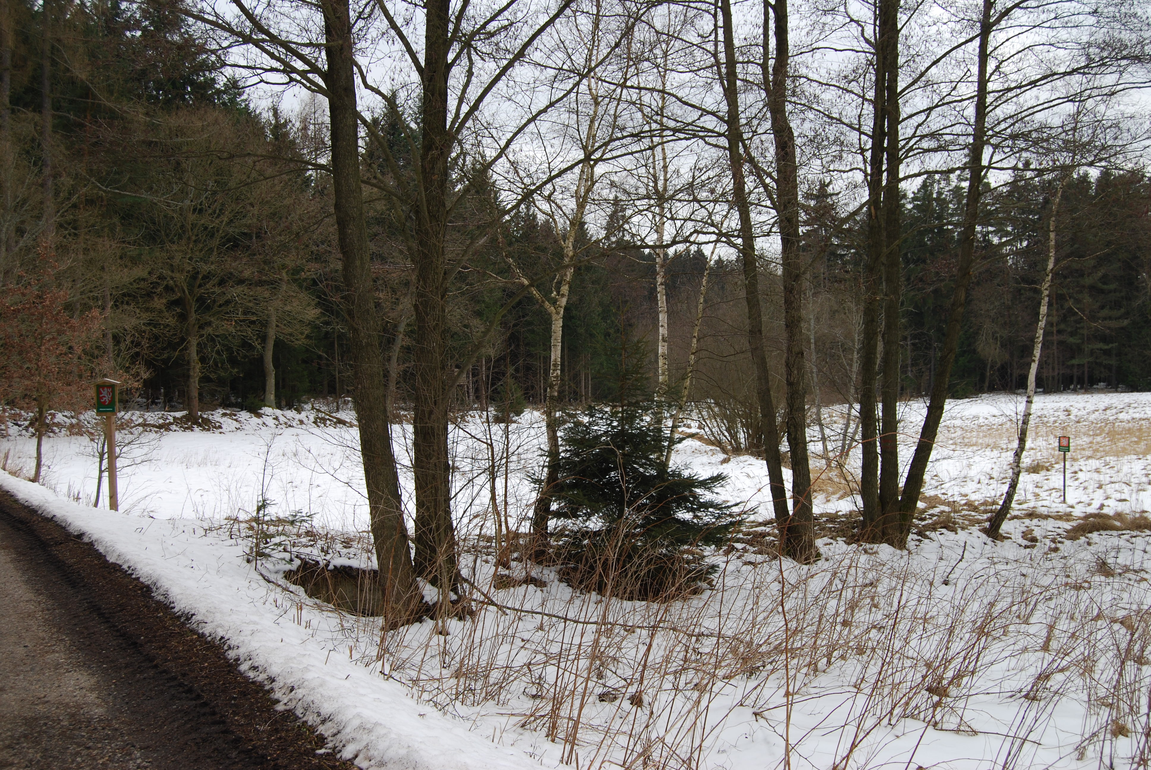 Přírodní památka Malý Kosatín ev. č. 982. Boudy. Okres Písek. Česká republika.